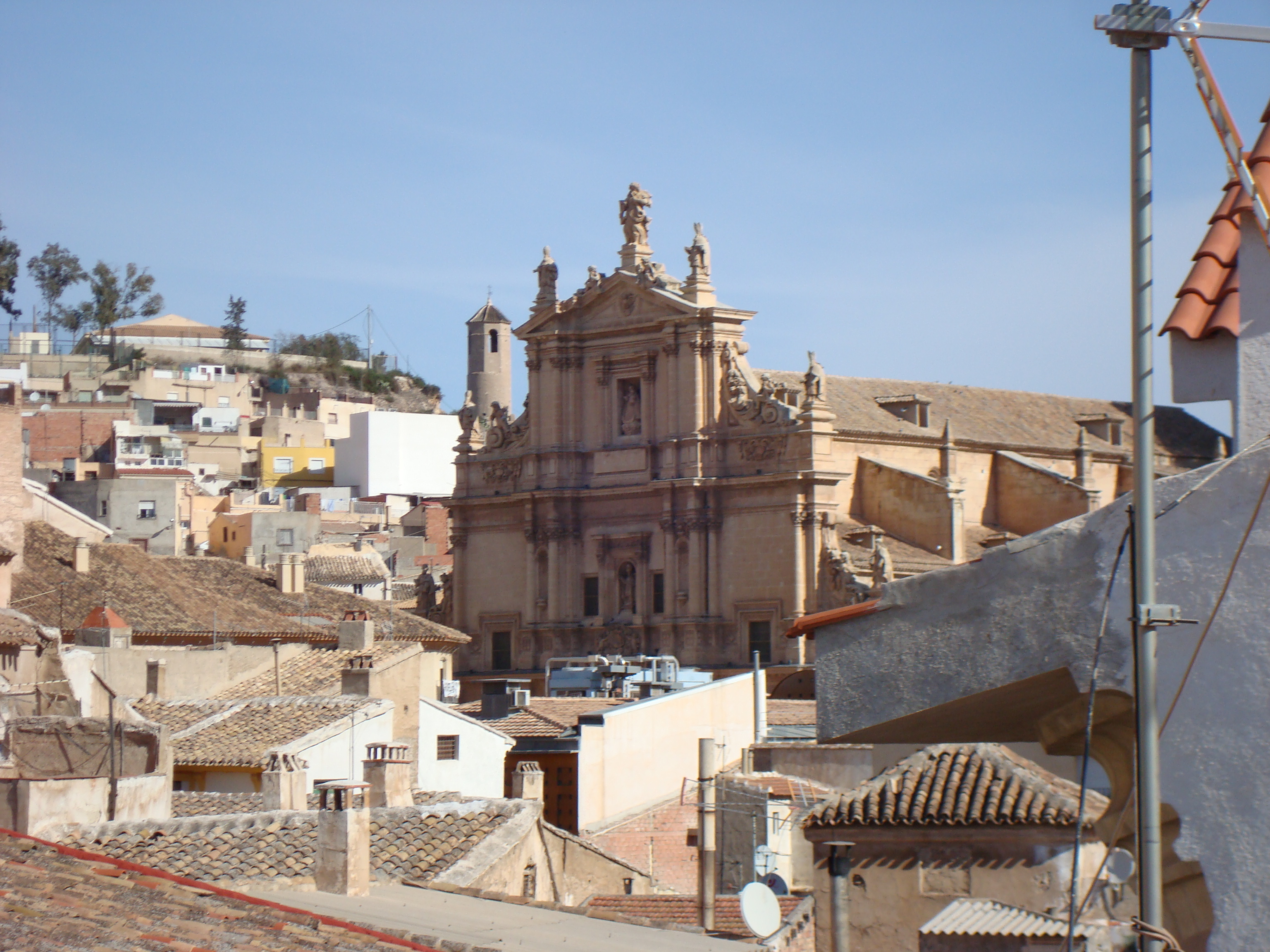 Fachada de la Colegiata de San Patricio, Lorca